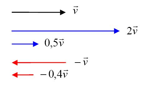 množenje vektora skalarima